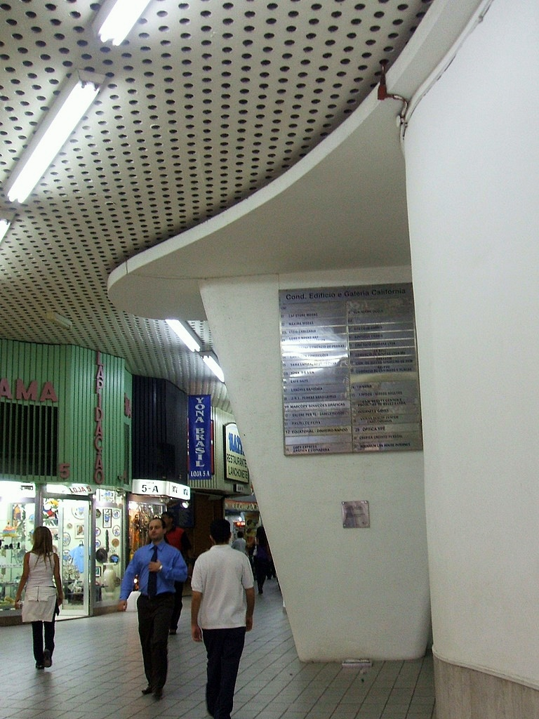 Interior do Edifício Califórnia, projeto de Oscar Niemeyer (1951); rua Barão de Itapetininga, centro da cidade de São Paulo, Brasil.